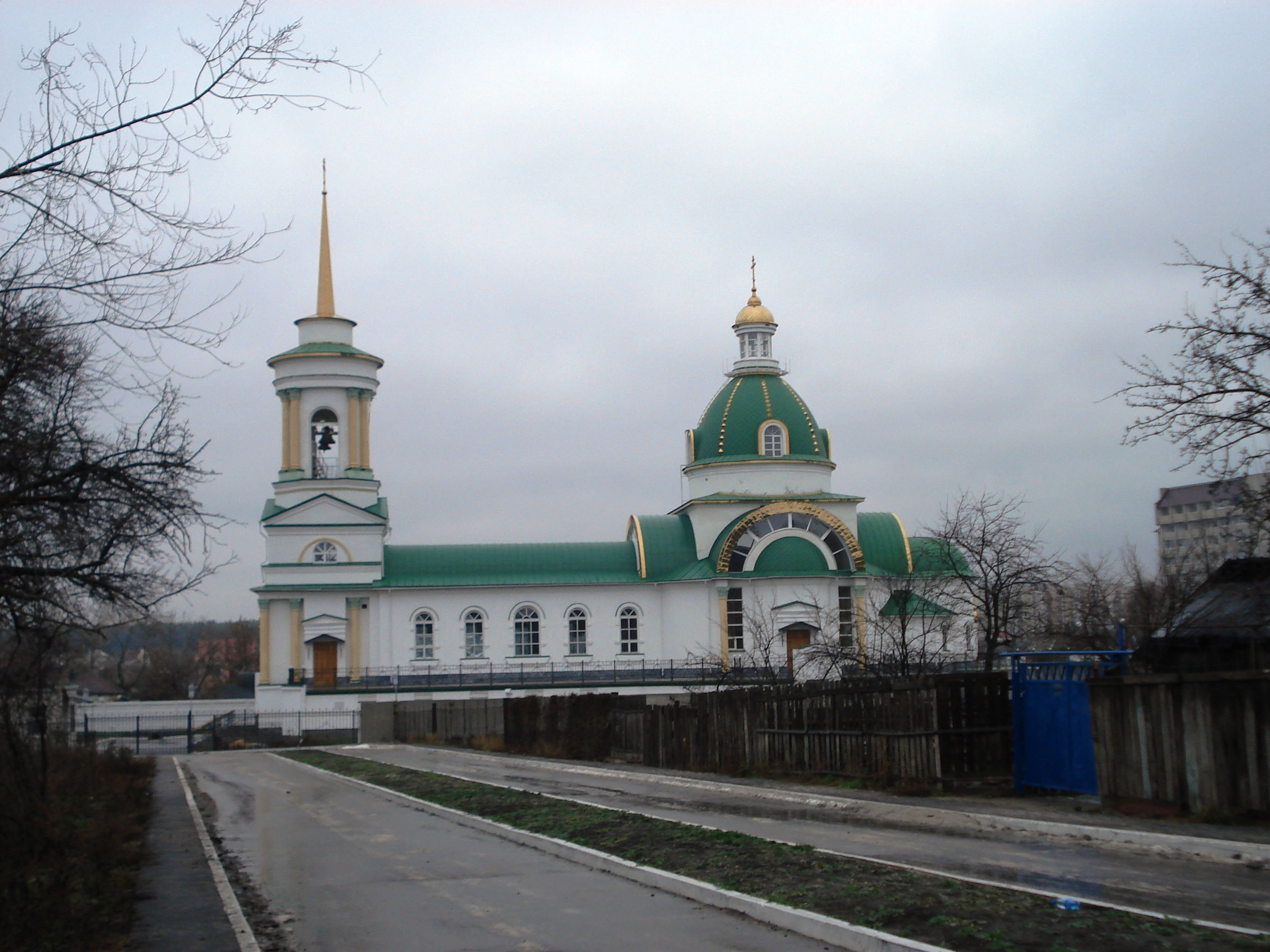 Храм Христа Спасителя в Нововоронеже